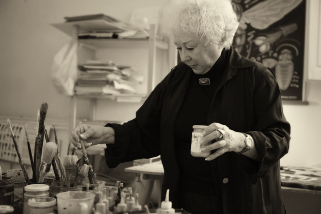 presso lo studio